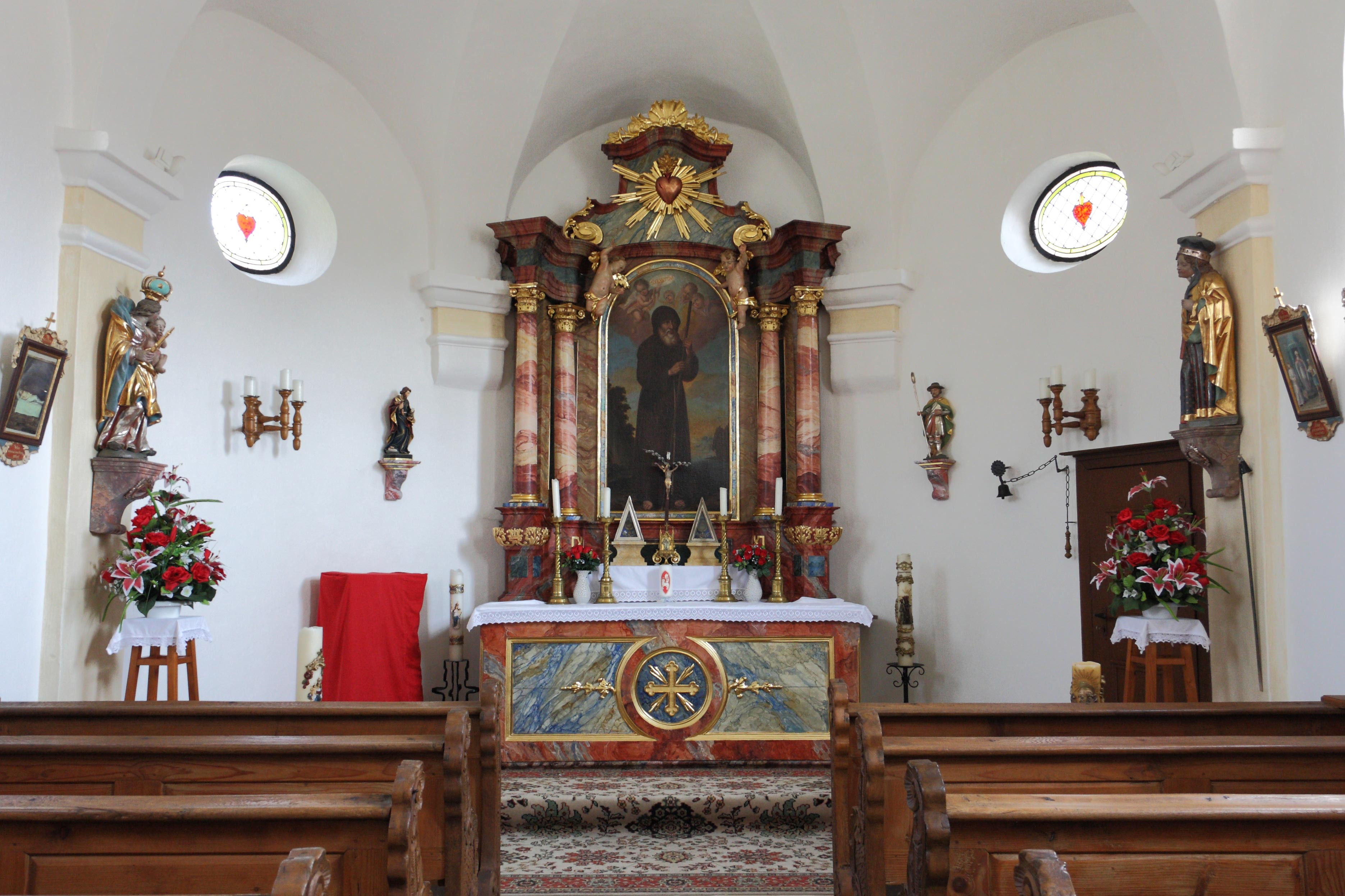 Kapelle St. Franz von Paula in Unggenried (Mindelheim)